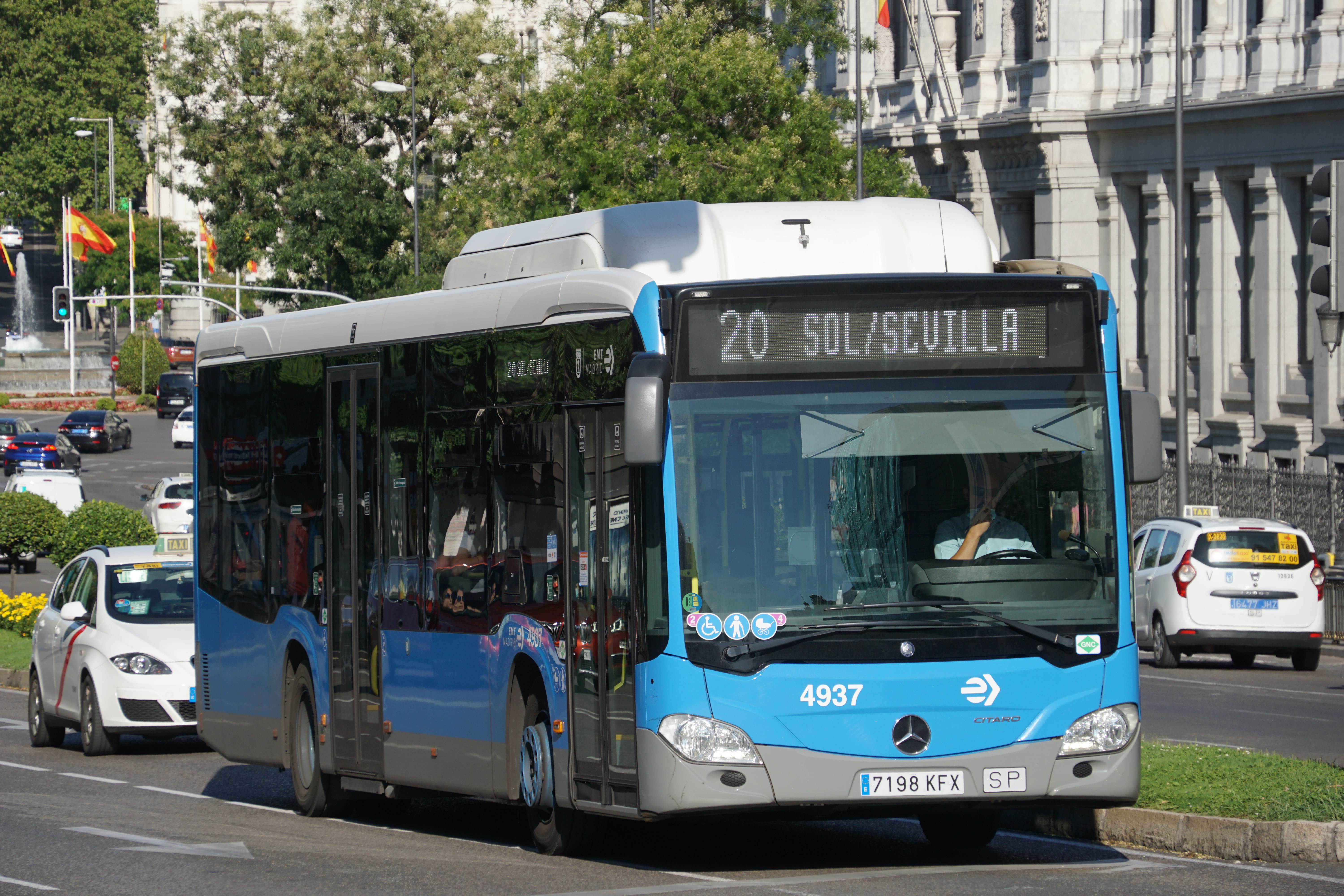 20 EMT Madrid en la calle Alcalá, agosto 2020